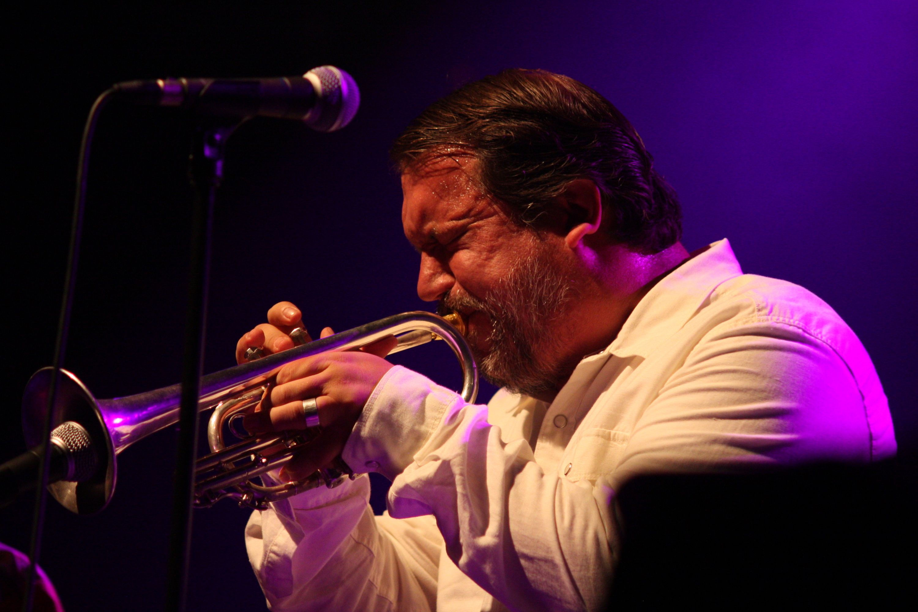 44. Deutsches Jazzfestival Frankfurt 2013: Rob Mazurek